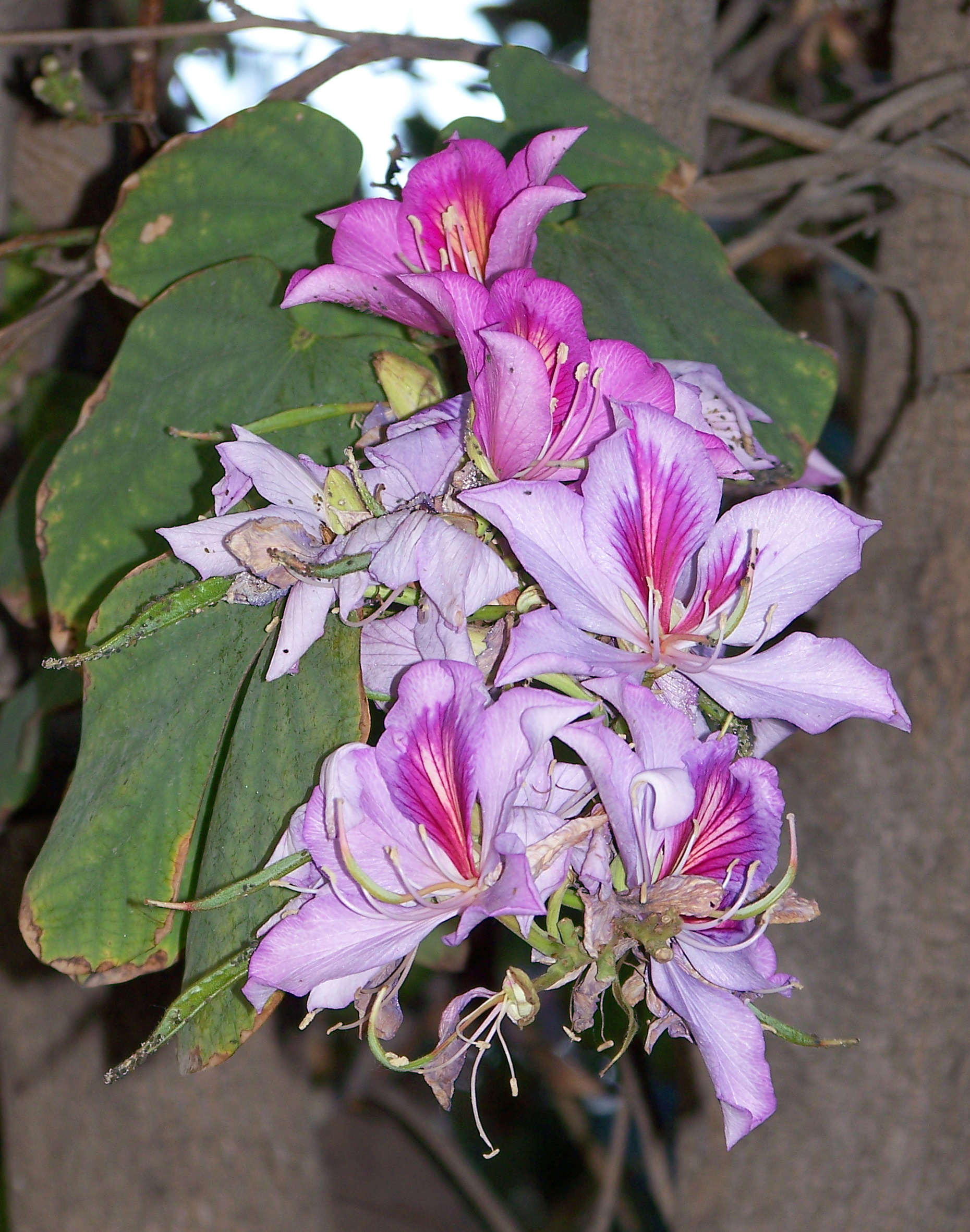 Bauhinia variegata (Pata de vaca, Árbol de las orquídeas) - Plaza de la Montañeta, Alicante (España).